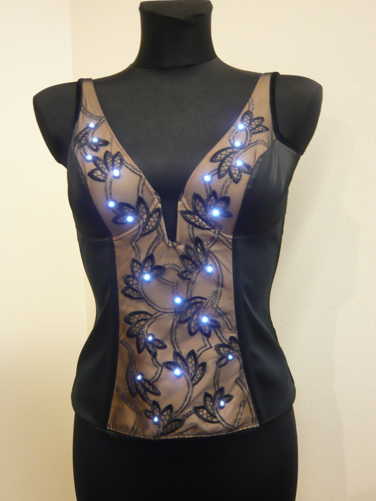 LED Corsage realized by Forster Rohner Textile Innovations for Valisère